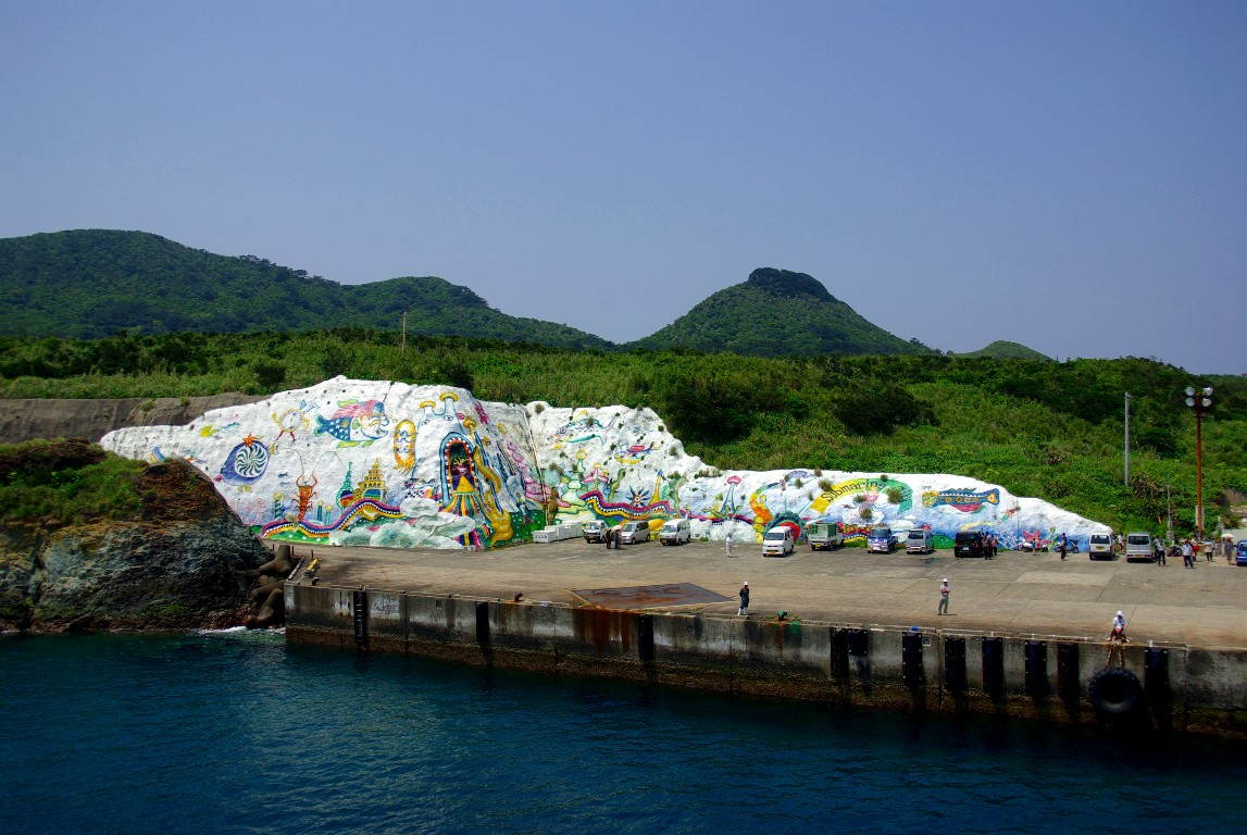 トカラ列島宝島港の壁画と女神山